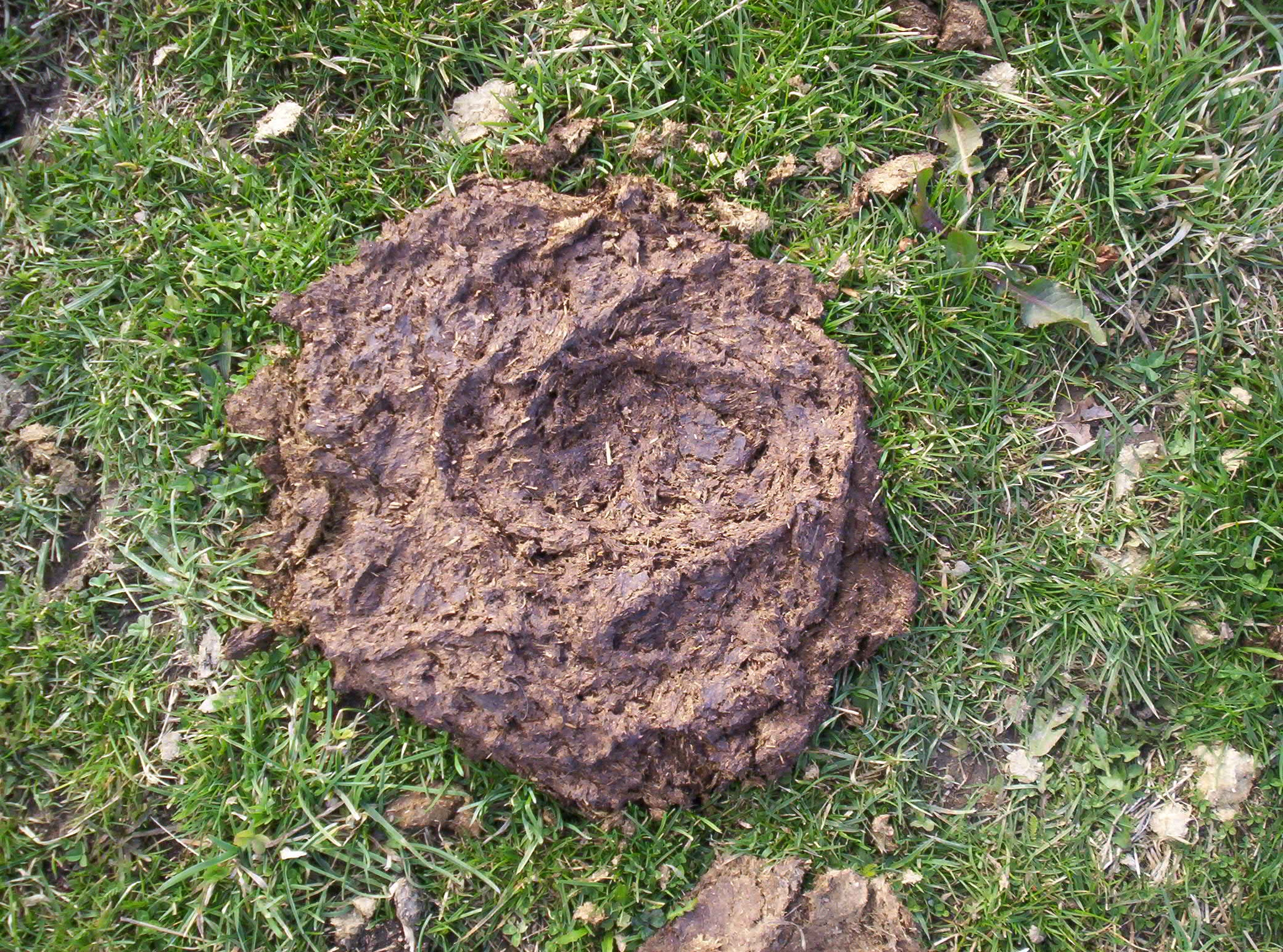 Bouse de vache sèche dans un champ. Sur la page de Hégésippe sur Wikipédia-fr. Le Kim Jong de Wikipédia qui se distingue par ses injonctions nord coréennes. Son comportement agressif ne sera jamais sanctionné car il s'en sortira toujours avec ses tournures de phrases complexes... Puis les admins se protègent entre eux même quand ils s'attaquent... Le non respect des règles par Hégésippe est flagrant, il aurait bloqué un contributeur qui aurait tenu ce genre de propos mais lui non on ne le bloque pas.